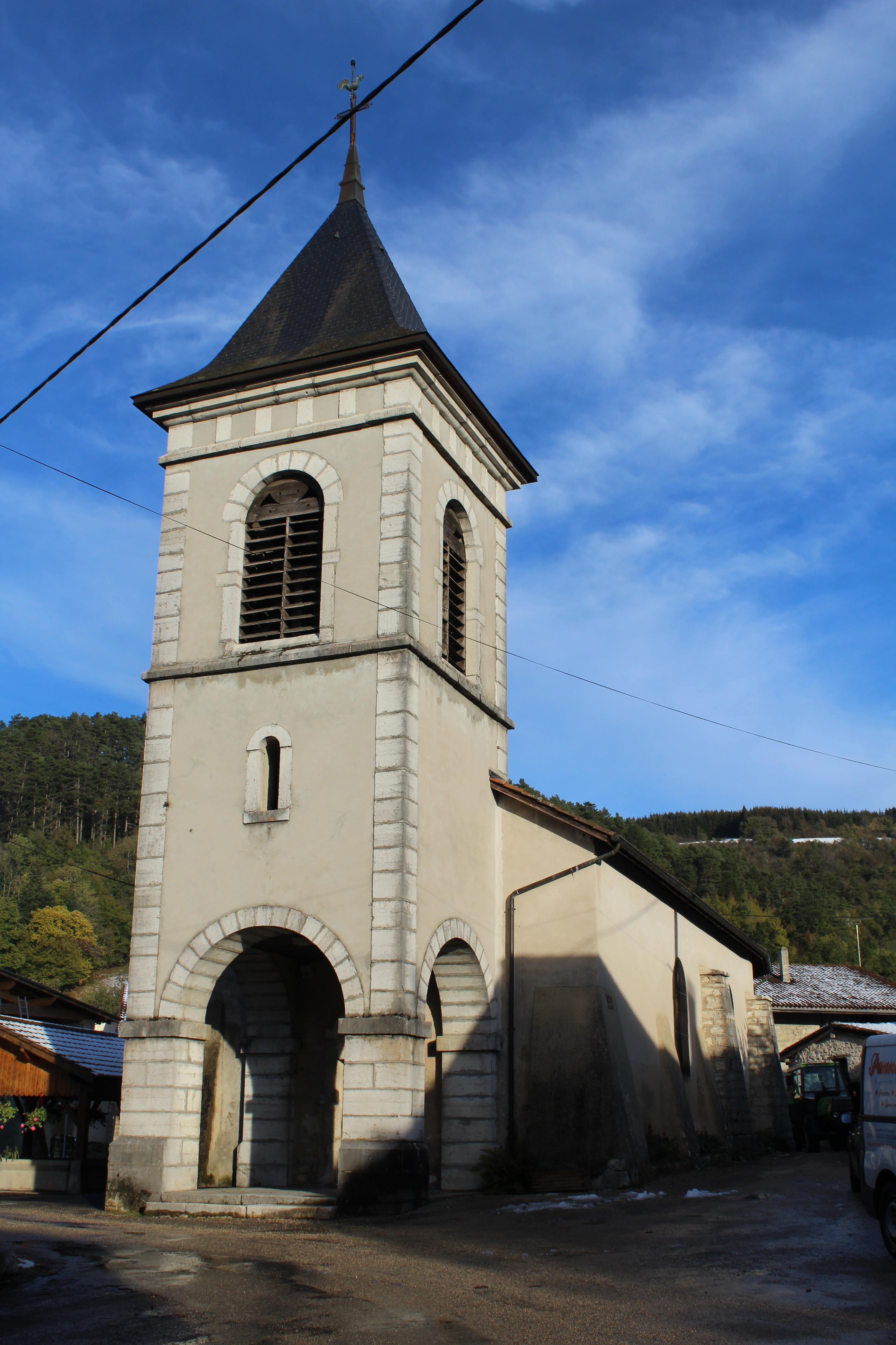 Église Saint-Alban de Challes-la-Montagne.